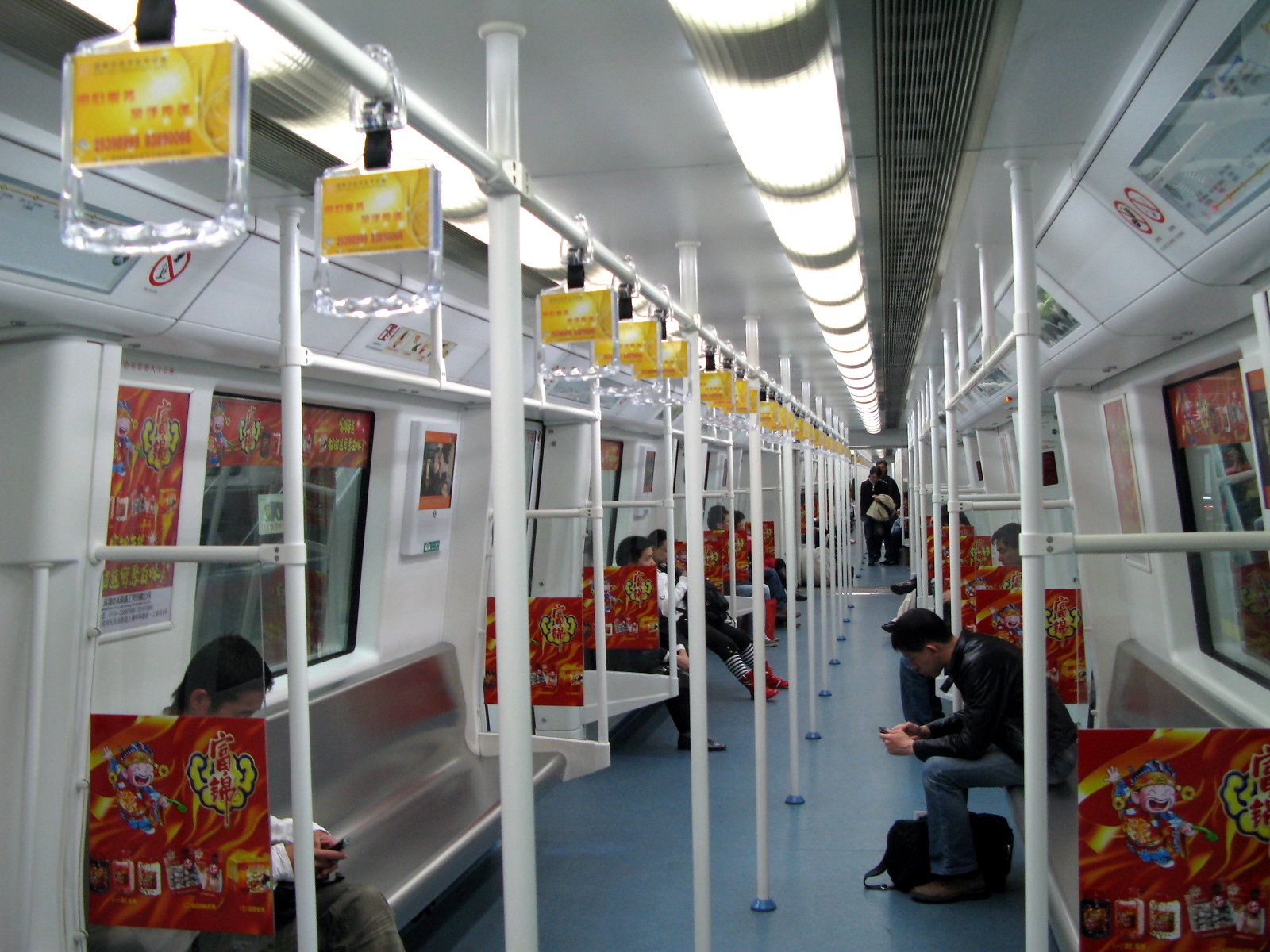 ShenZhen Metro Train Interior